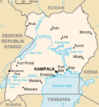 Karte von Uganda